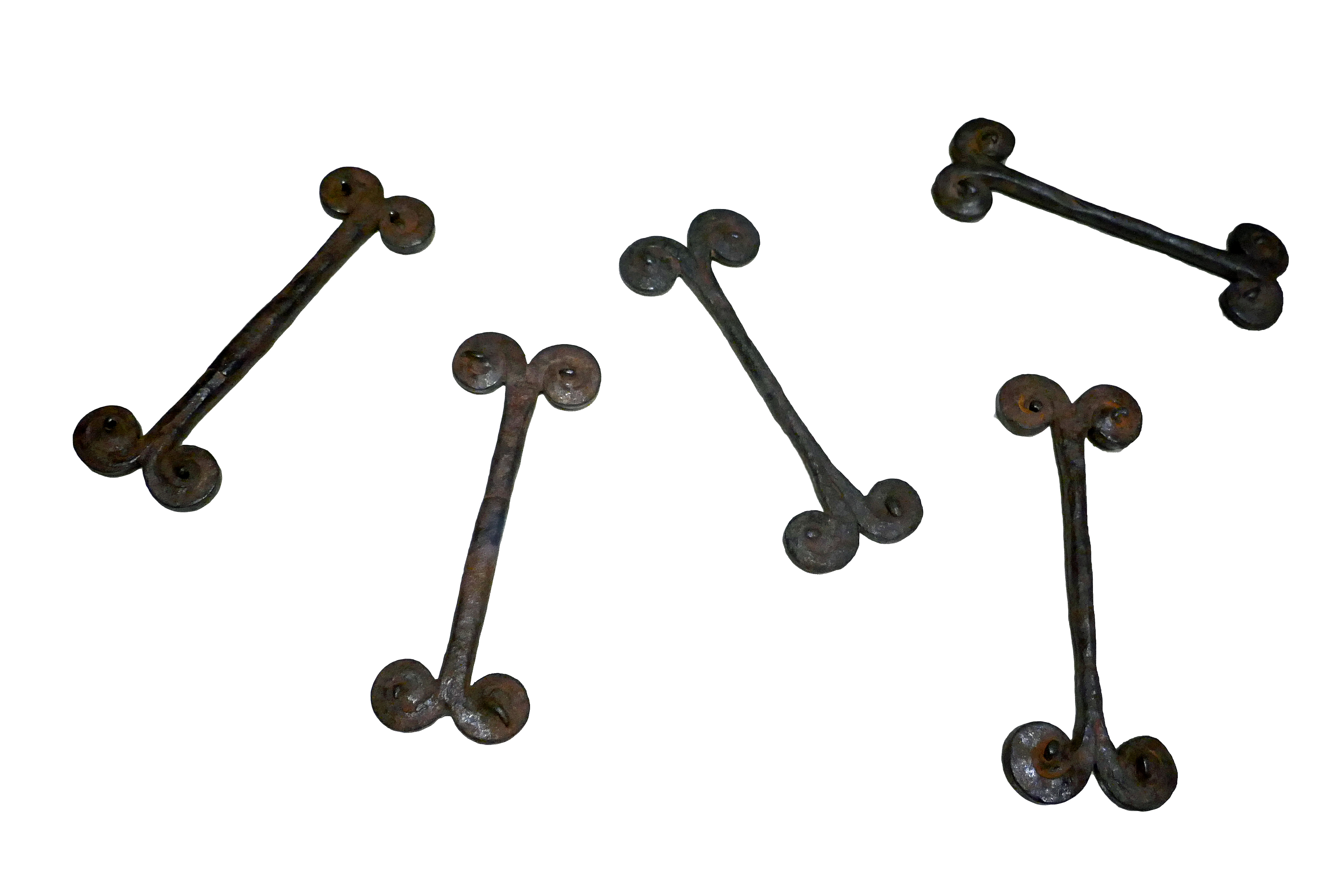 Monnaie composée de barres Population Mafa Cameroun et Nigeria Artiste inconnu Fin du 19e-début du 20e s. Fer Collection privée Objet présenté lors de l'exposition Frapper le fer. L'art des forgerons africains au musée du quai Branly Jacques Chirac.